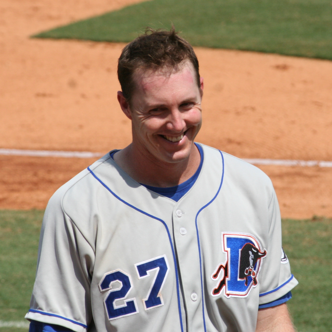 Chris Richard